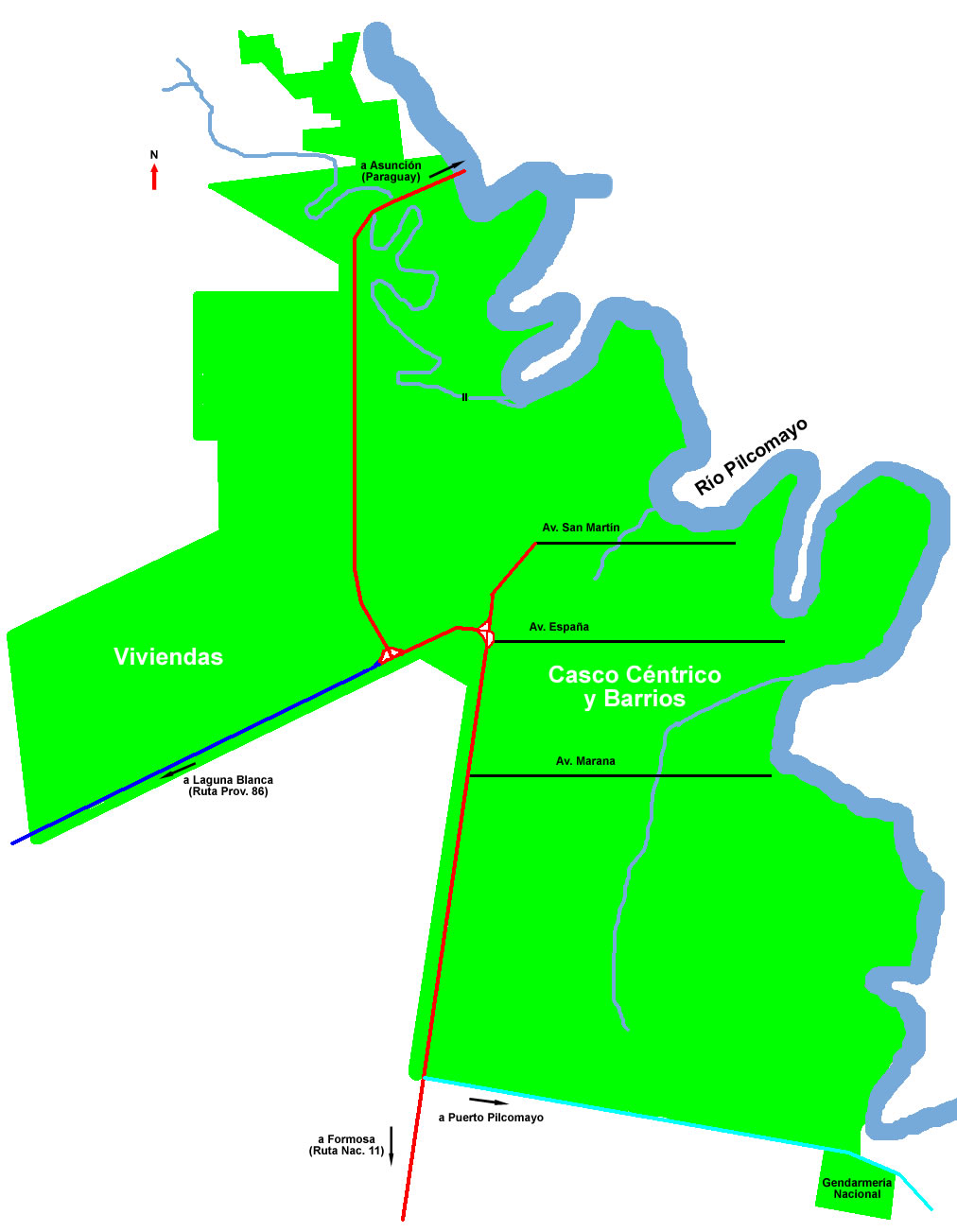 Vista de las Viviendas y el casco céntrico de Clorinda. View of Clorinda's suburbs.